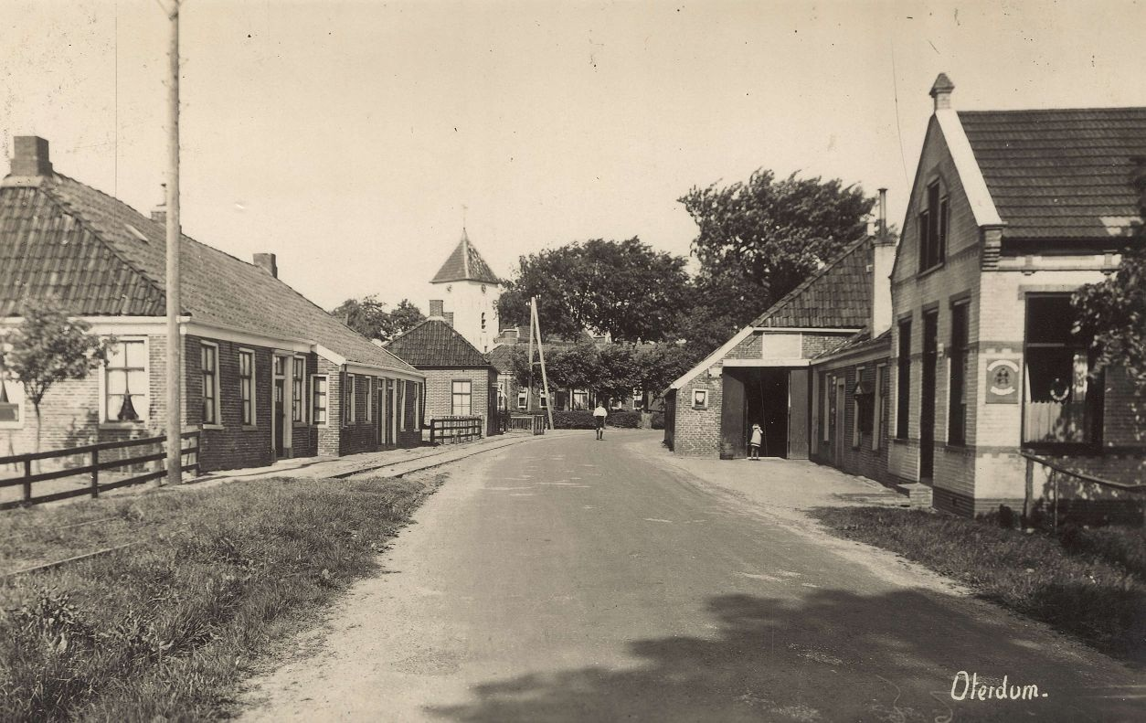 Dorpsgezicht Oterdum omstreeks 1920-1922 met op de achtergrond de kerktoren en links de in 1919 aangelegde trambaan van de Stoomtram Oostelijk Groningen. Het dorp werd afgebroken tussen 1966 en 1974.